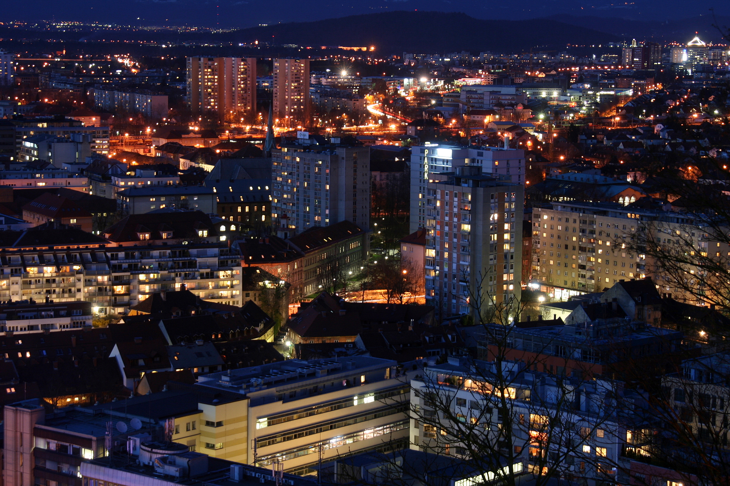 okenca ljubljanska